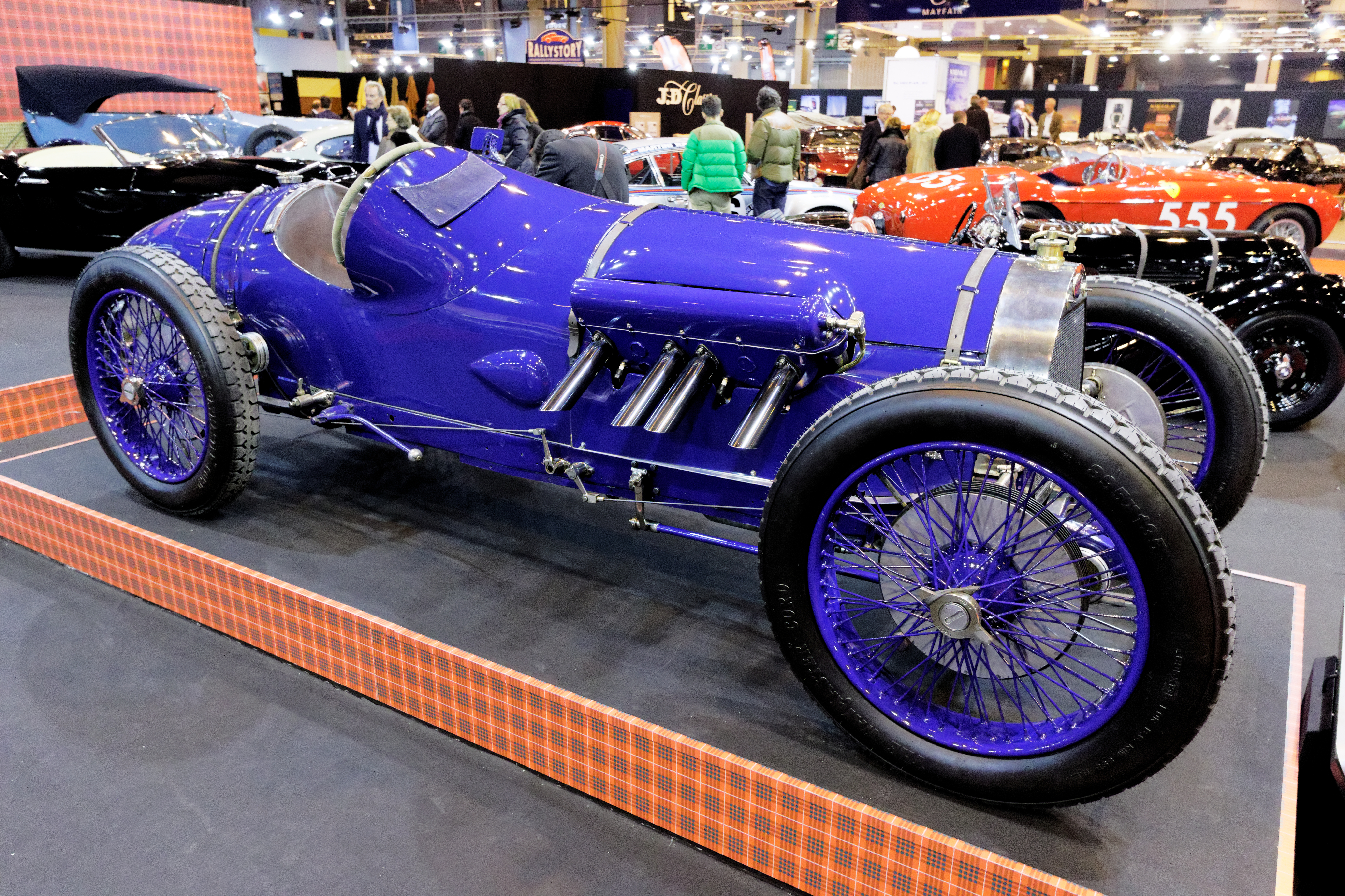 Une des voiture présentée lors du salon Rétromobile de Paris 2015